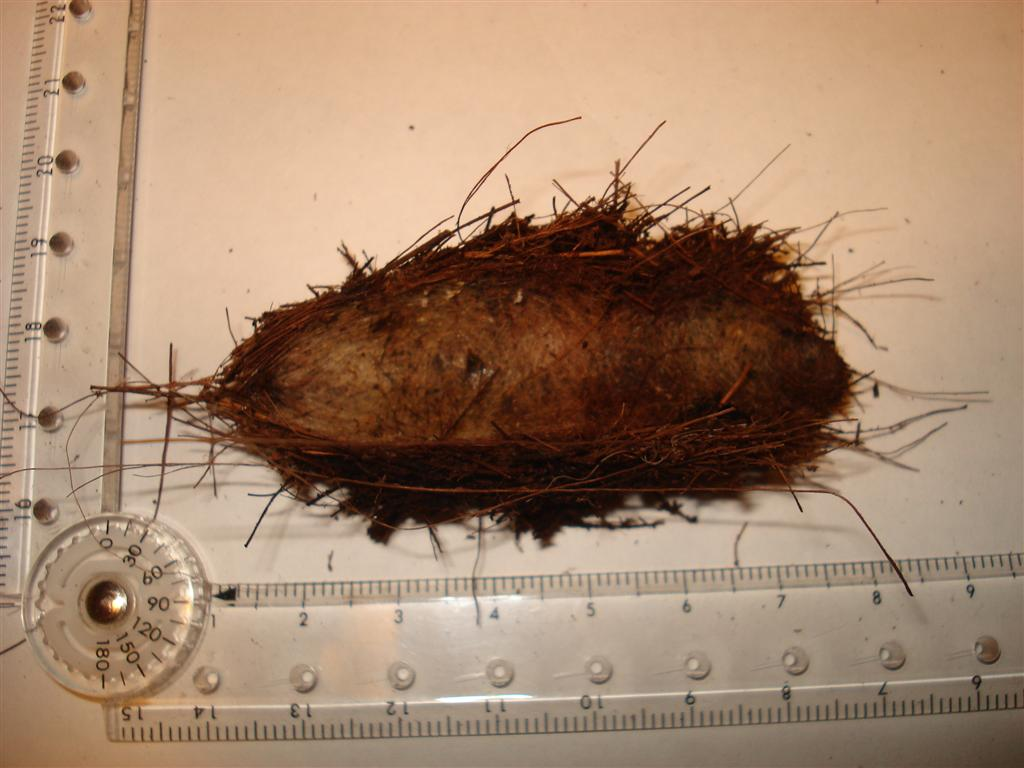 Cocon de Paysandisia archon